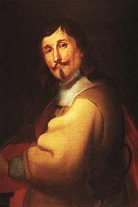 Ritratto di Giacomo Torelli. Autore ignoto del XVII secolo. Opera esposta al museo civico di Fano